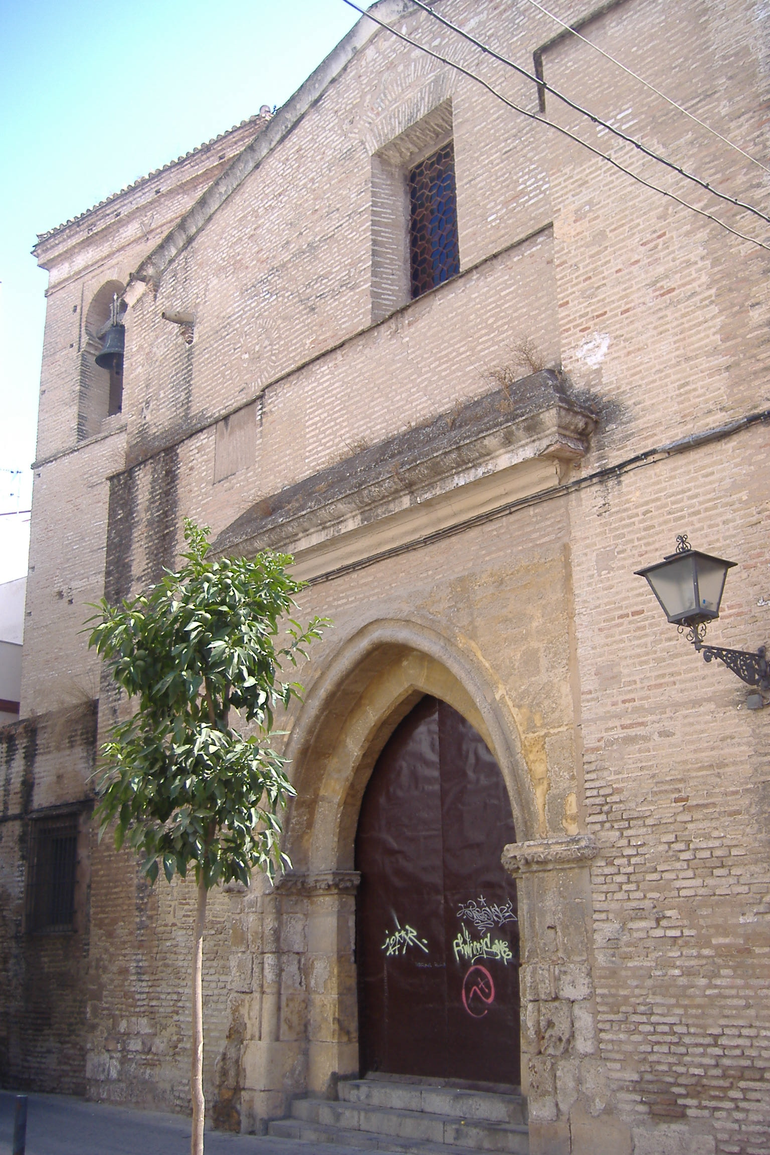 Fachada principal de la iglesia de San Martín en Sevilla (España)